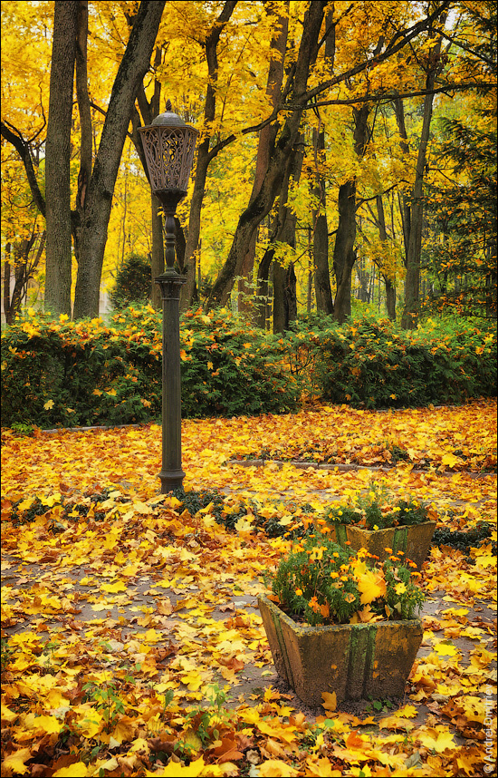 Жыліцкі палац